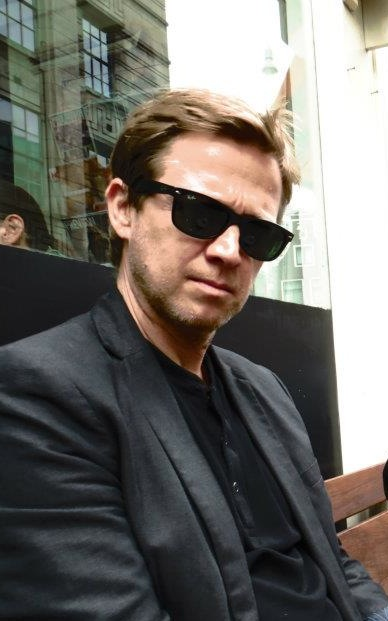 Damjan Kozole, Amsterdam